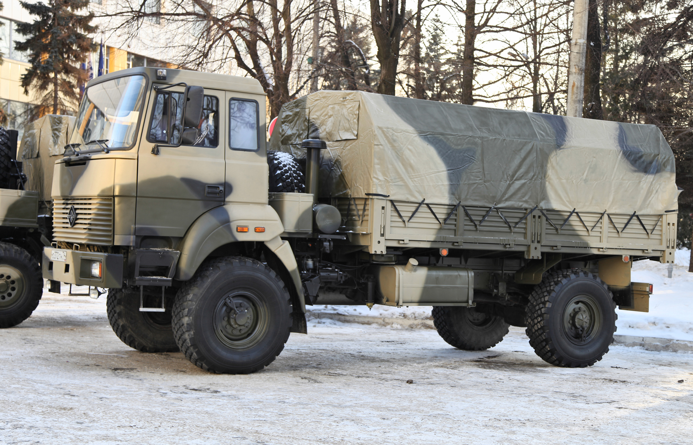 Бескапотный вариант Урал-43206 (Ural-43206 variant without the hood)